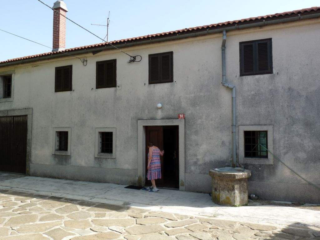 Domačija Rudija Šeliga, Sabonje